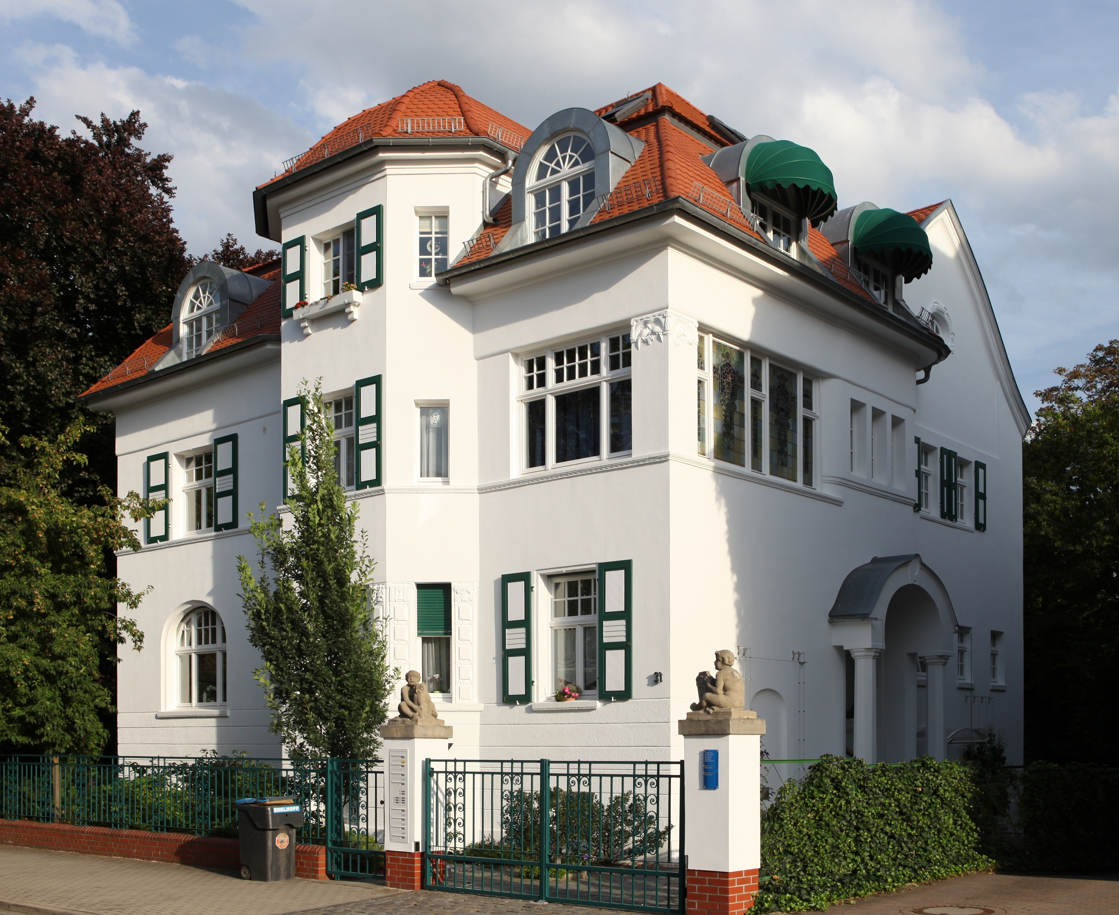 Kulturdenkmal MIetvilla Am Anger 31 Laaservilla in Eilenburg; Objektnummer: 08973299